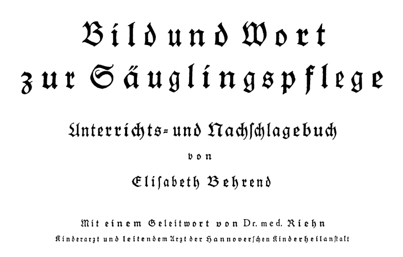 Ausschnitt aus dem Innentitel des 1928 im Verlag B. G. Teubner in Leipzig erschienenen Werkes „Bild und Wort zur Säuglingspflege Unterrichts- und Nachschlagebuch“ der Autorin und Zeichnerin Elisabeth Behrend, für die „Dr. med. Dr. med. Riehn“, der Kinderarzt und leitende Arzt Kinderheilanstalt in Hannover das Geleitwort schrieb ...